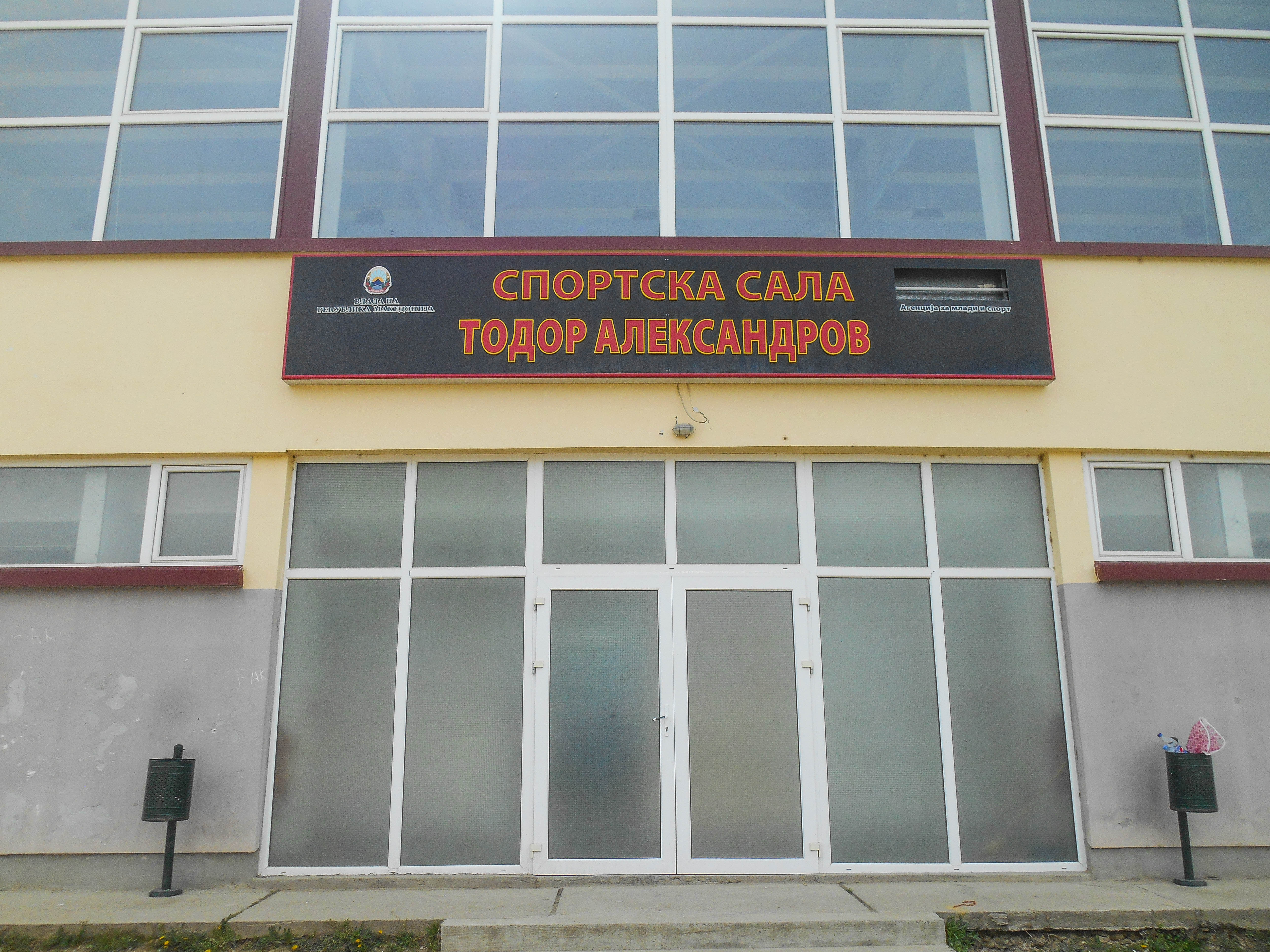 Спортска сала Тодор Александров - Куклиш